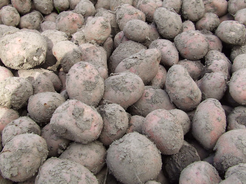 Solanum tuberosum. Dasiūnai, Kaunas district, Lithuania.